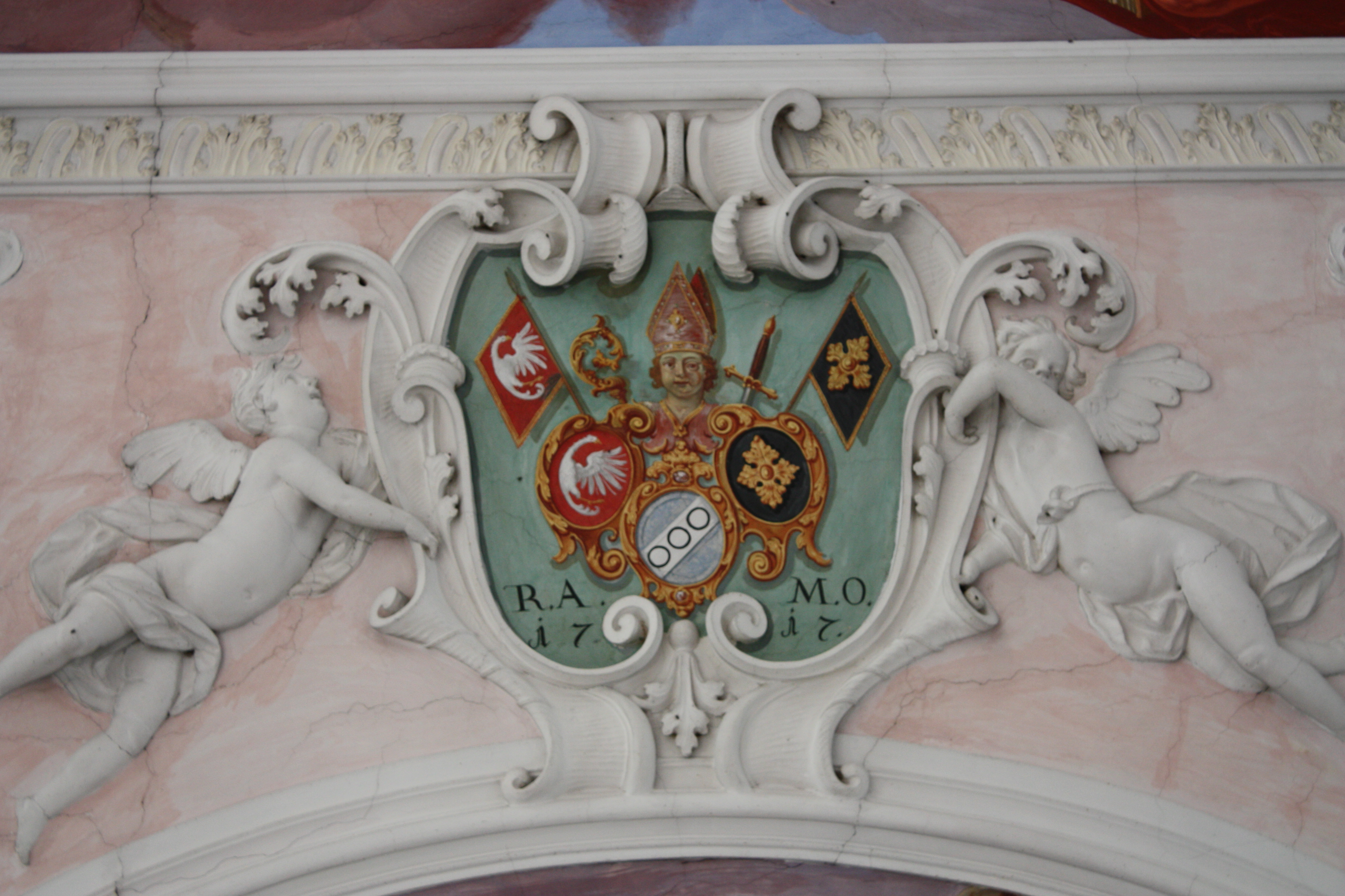 Das Kloster Ottobeuren